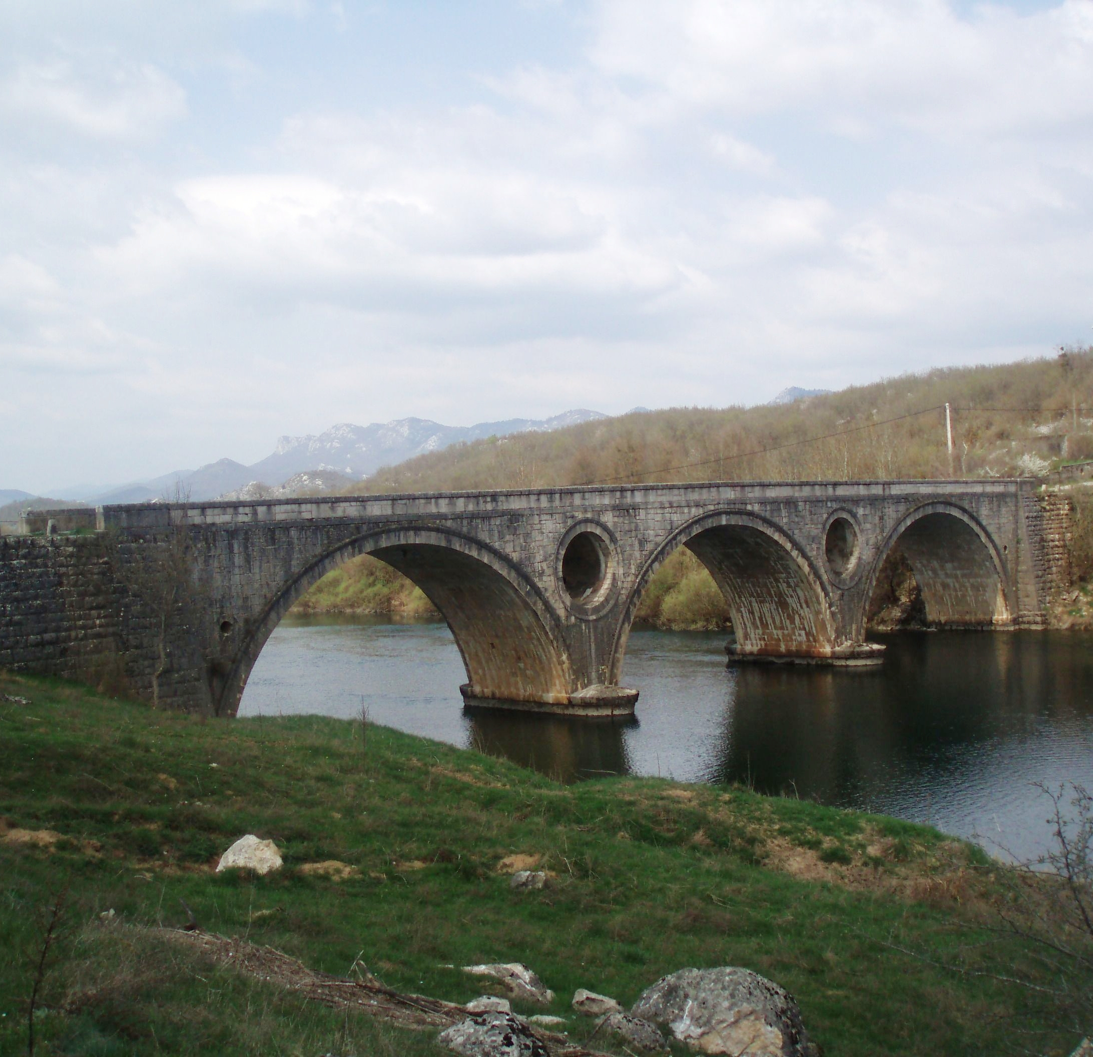 Kosinjski most